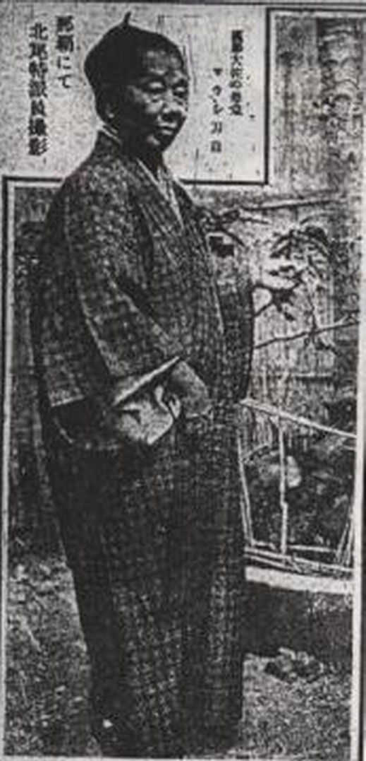 玉那覇オト 漢那憲和の母